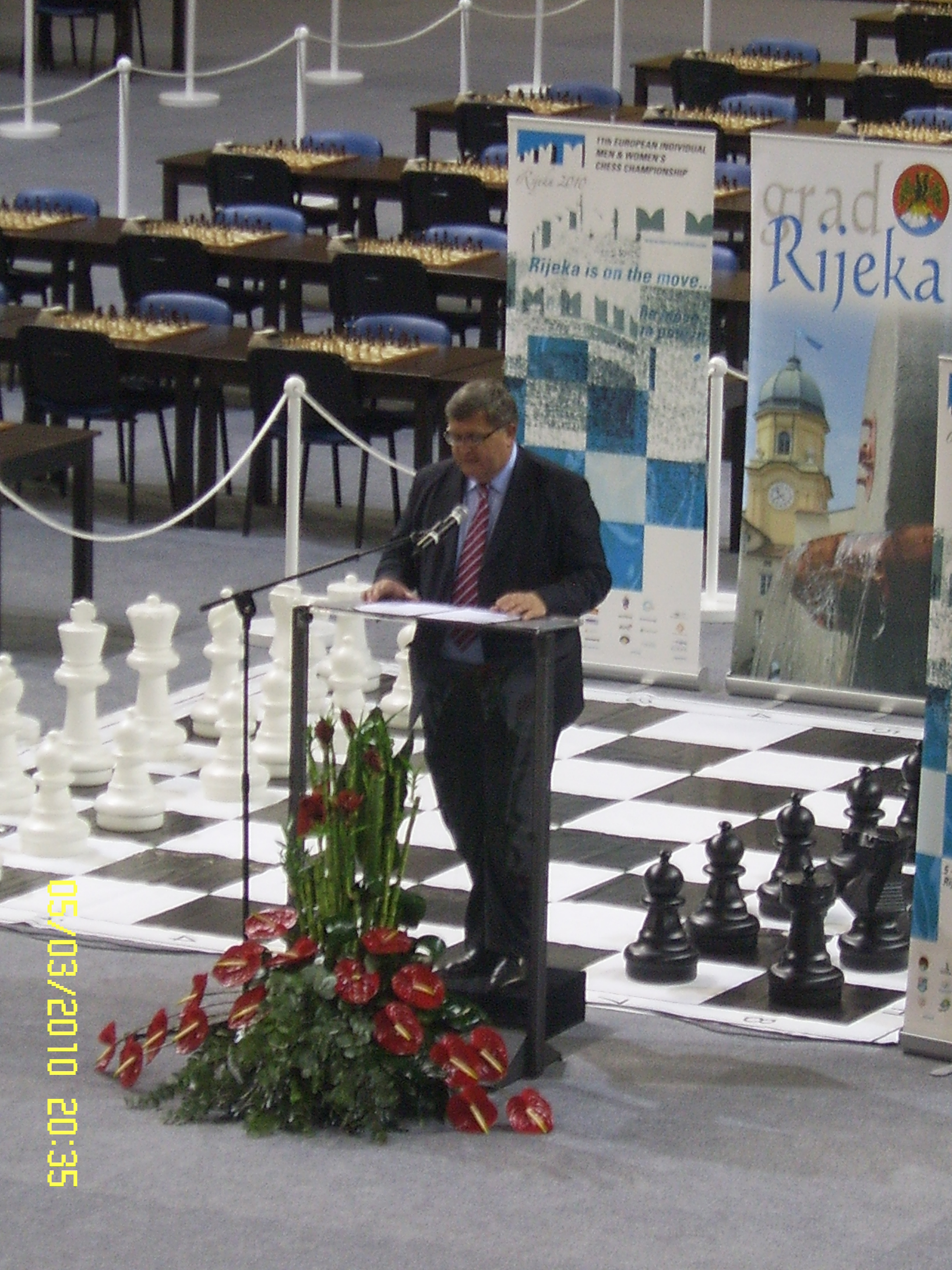 Gradonačelnik Rijeke Vojko Obersnel prilikom otvaranja Europskog šahovskog prvenstva u Rijeci, 2010.